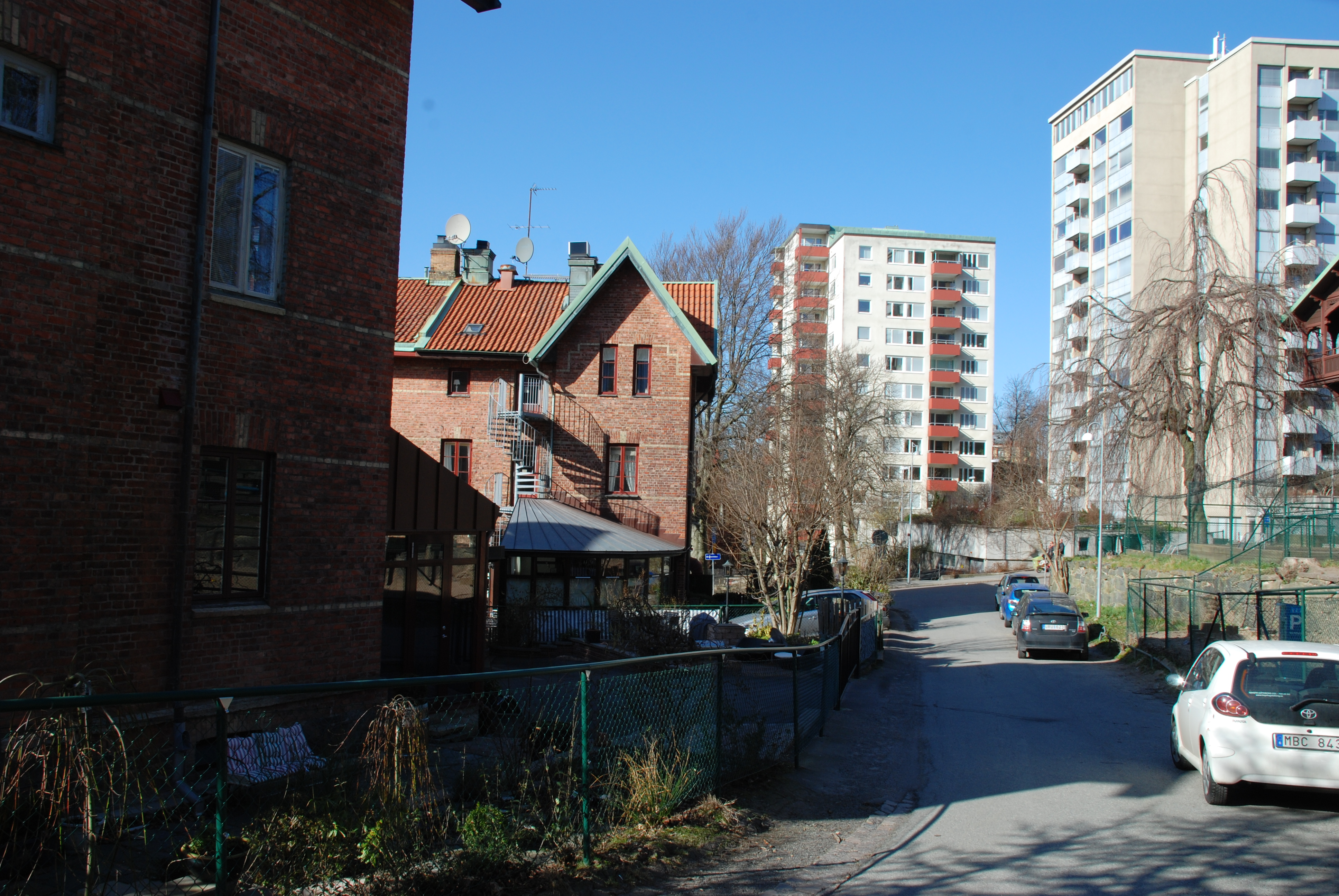 Besvärsgatan i stadsdelen Annedal i Göteborg i riktning norrut mot Föreningsgatan.